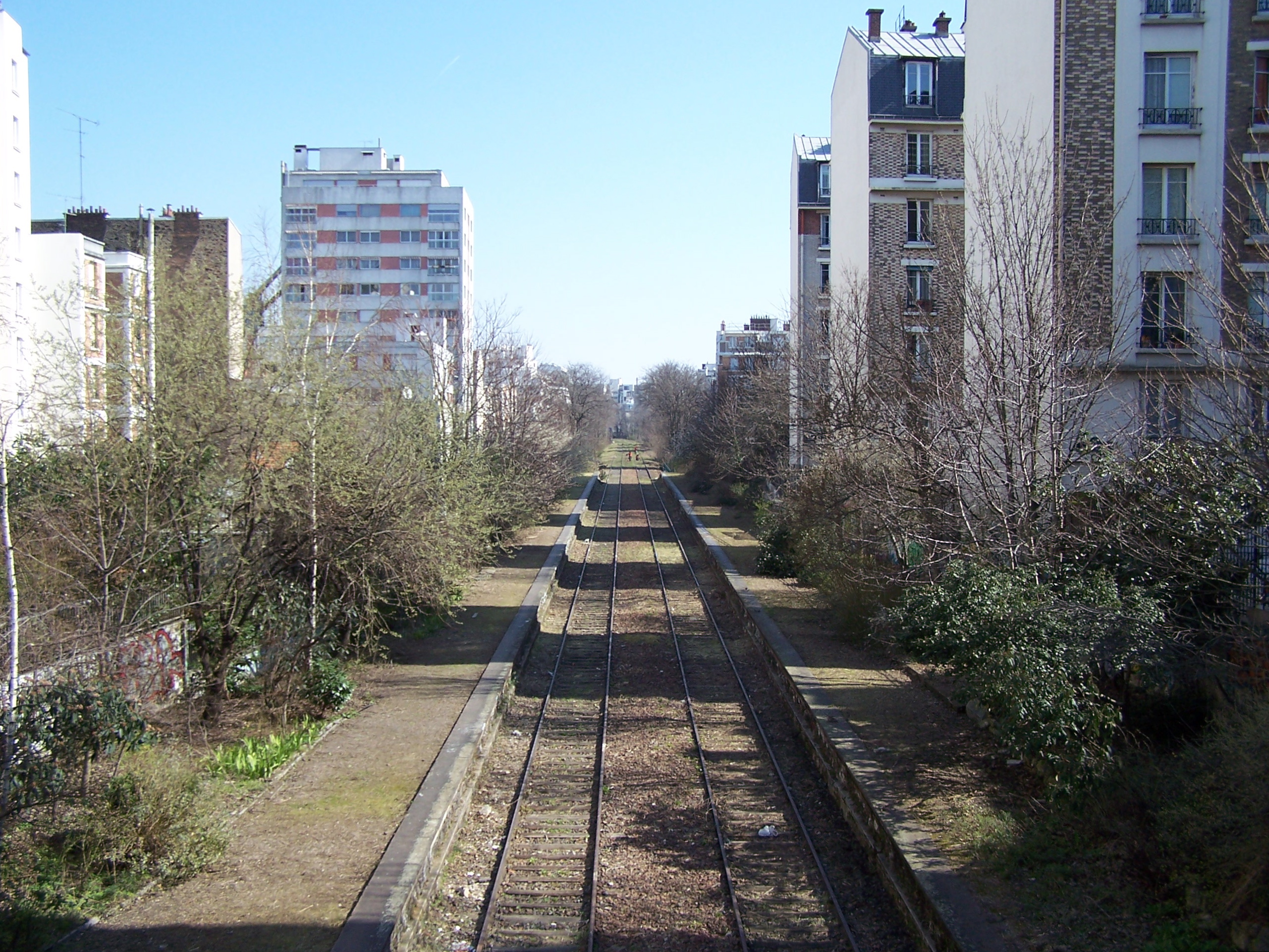 Vue de la ligne de petite ceinture au niveau de la passerelle de la rue des Meuniers, à Paris en direction du nord